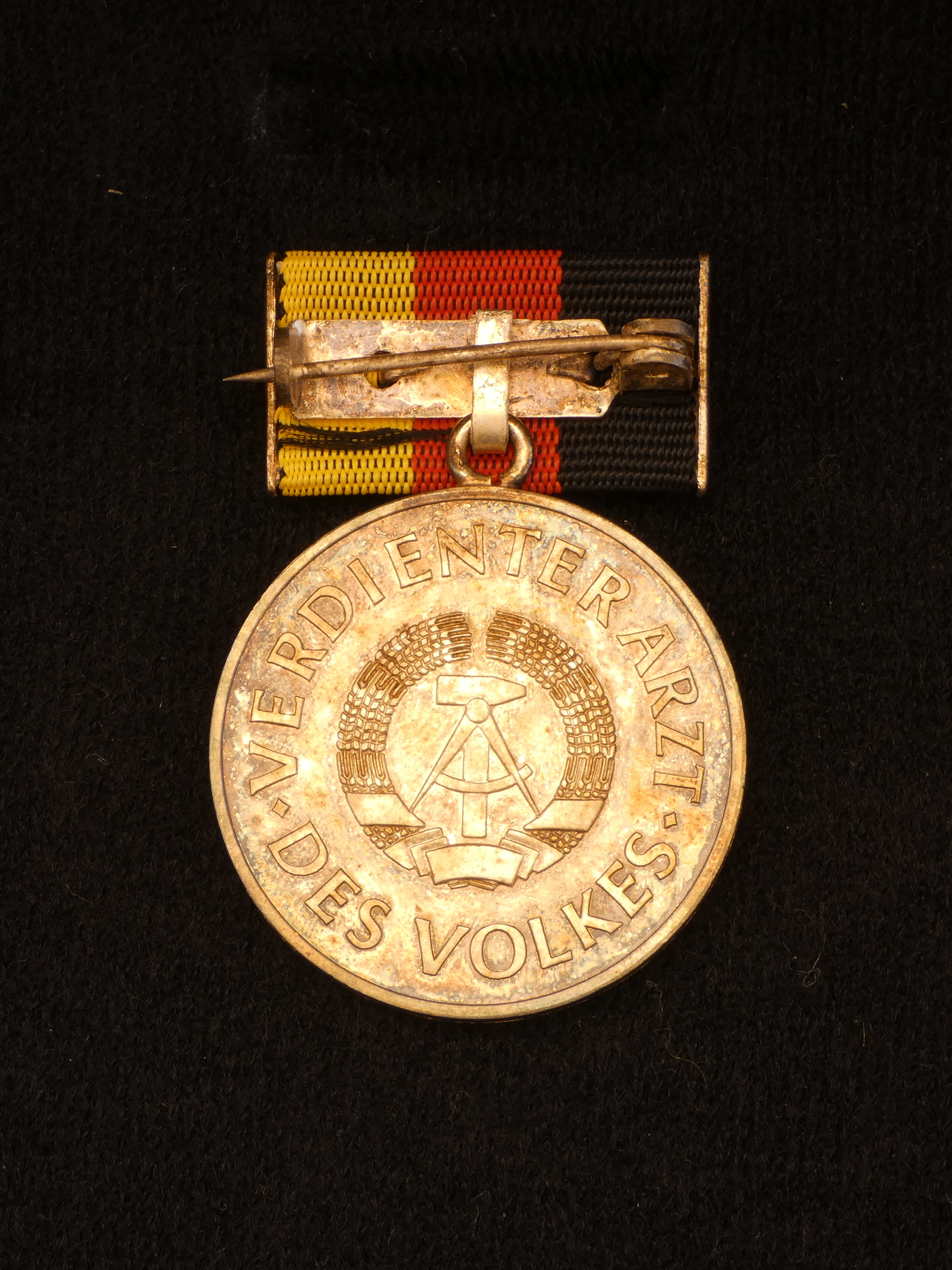 Medaille Verdienter Arzt des Volkes, Rückseite, Helga Matheoschat, 11. Dezember 1978; 1978er Medaille einmalig mit DDR-Wappen und schwarz-rot-gold stoffbezogener Spange; die Jahre zuvor mit Lorbeerzweig statt Wappen, die folgenden Jahre nur noch mit blauem Band